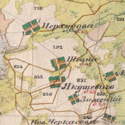 Деревня Шеино на карте 1850 года